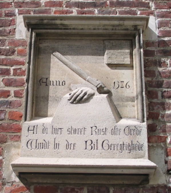 De bijl en rechterlijke macht in een muur van het kasteel van Gaasbeek - eigen foto